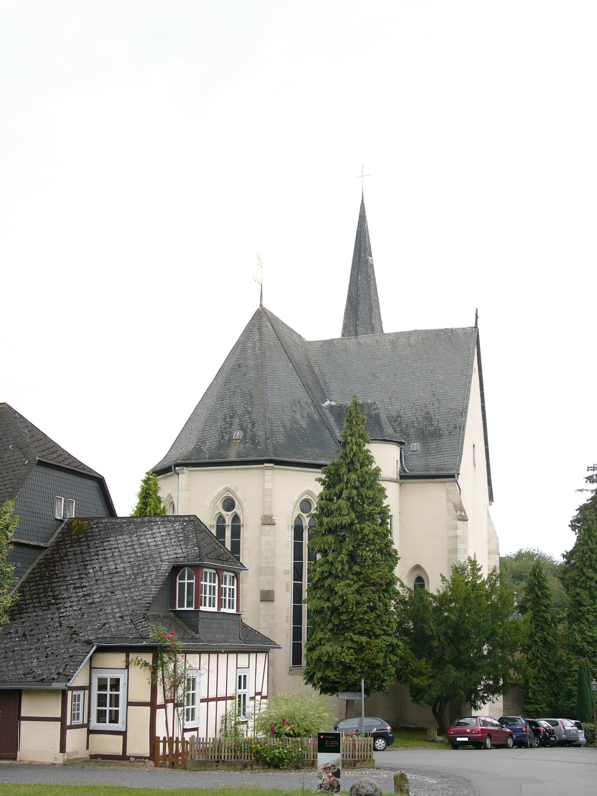 Klosterkirche des Klosters Altenberg bei Solms-Oberbiel (Lahn-Dill-Kreis)